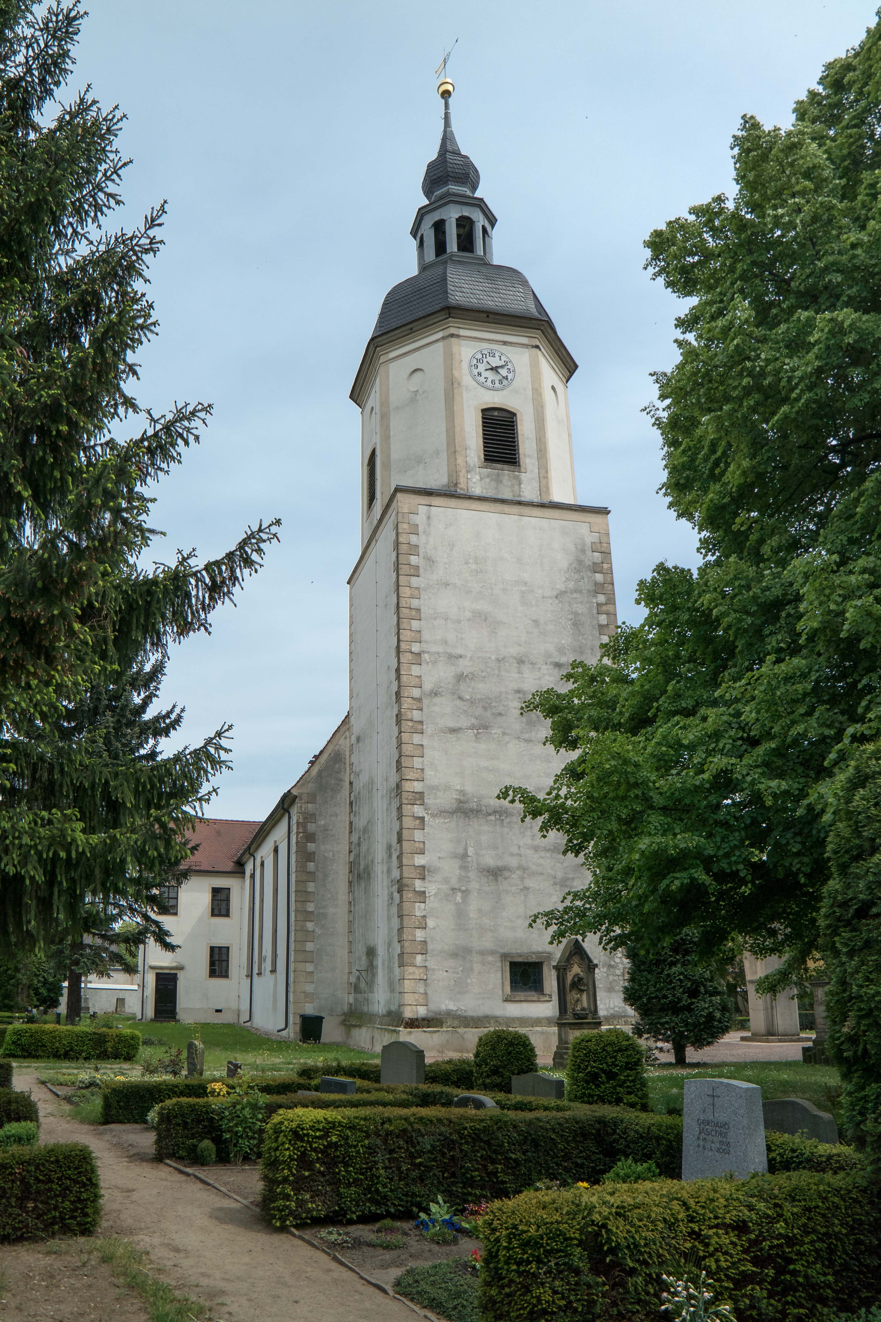 Kirche Gröba, Kirchstraße in Riesa